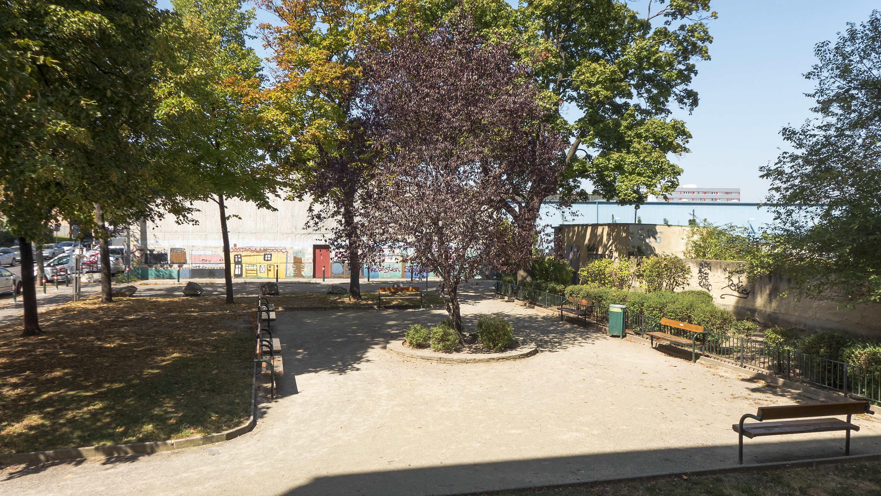 Brehmpark in Wien 11